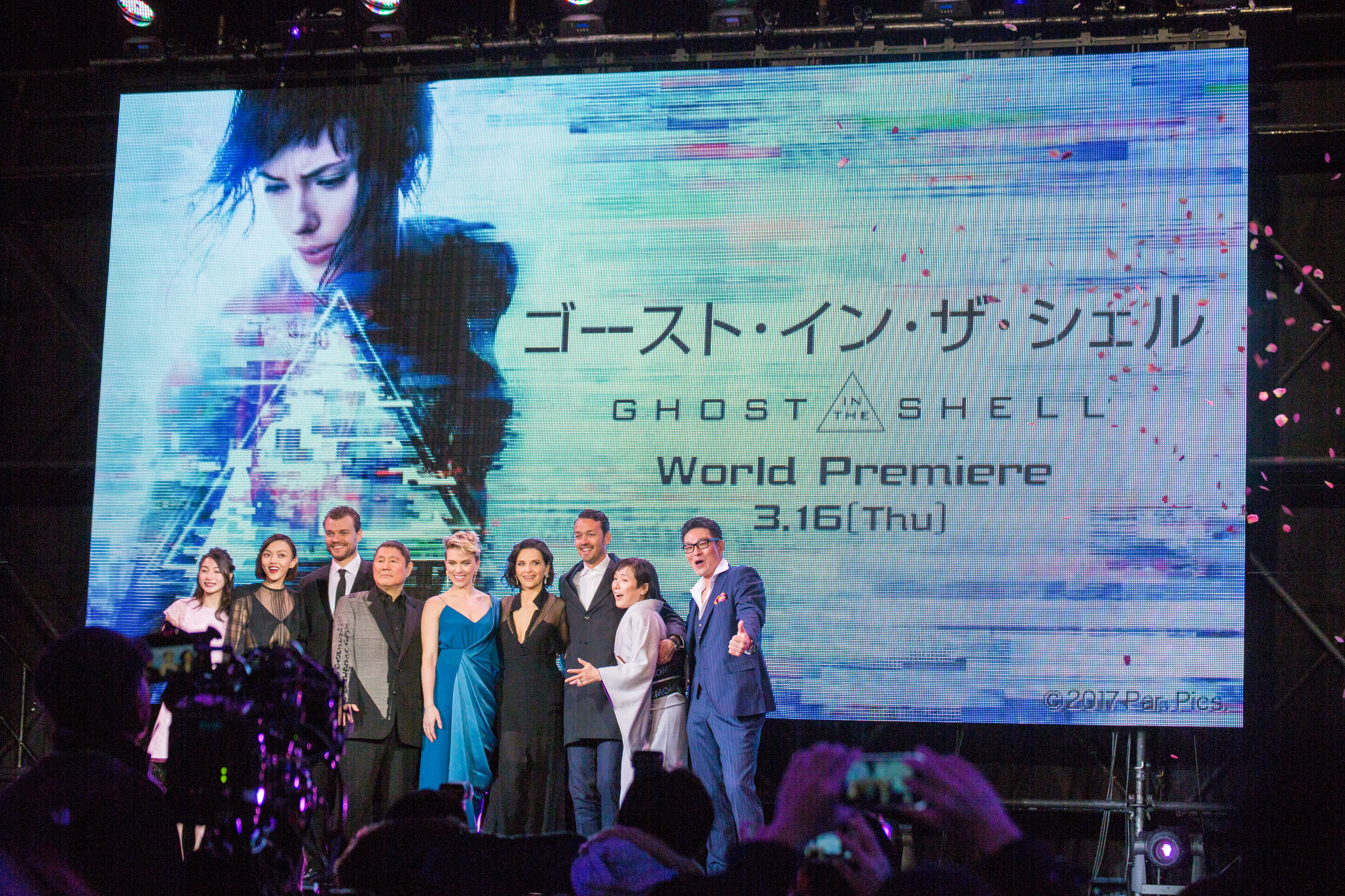 ゴースト・イン・ザ・シェル ワールドプレミアレッドカーペット 山本花織 福島リラ ピルー・アスベック ビートたけし スカーレット・ヨハンソン ジュリエット・ビノシュ ルパート・サンダース 桃井かおり 泉原豊